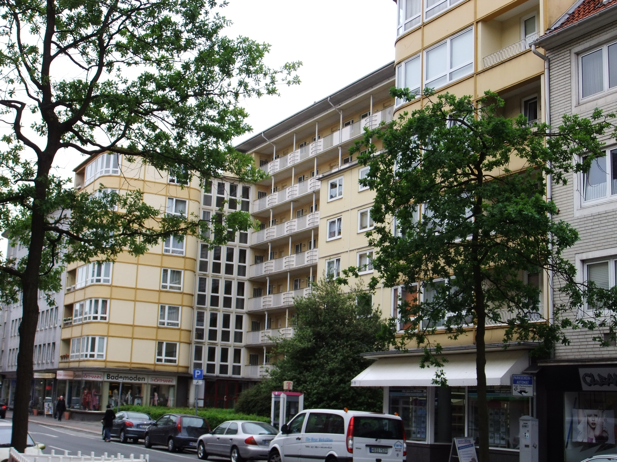 Wohn- in Bremerhaven, Bürgermeister-Smidt-Straße 120 . Das abgebildete Objekt ist ein geschütztes Kulturdenkmal in der Freien Hansestadt Bremen, mit der Nr. 3237 beim Landesamt für Denkmalpflege registriert.